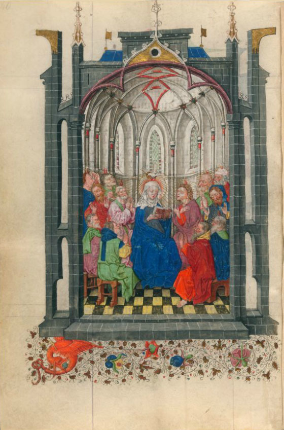 Getijden van Katharina van Kleef: Nederdaling van de Heilige Geest Morgan Library M.917 p.52